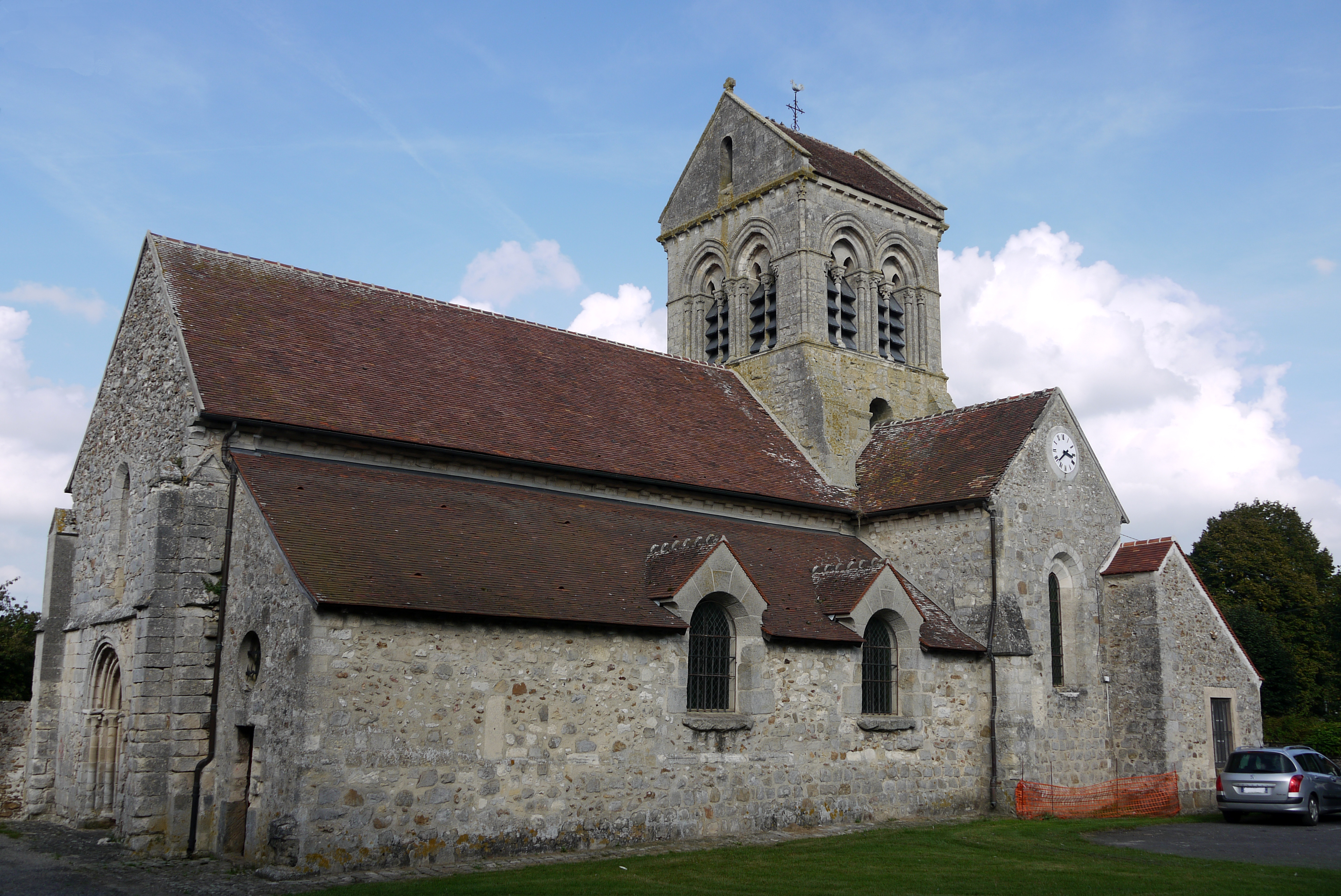 Église Saint-Michel de Brécy